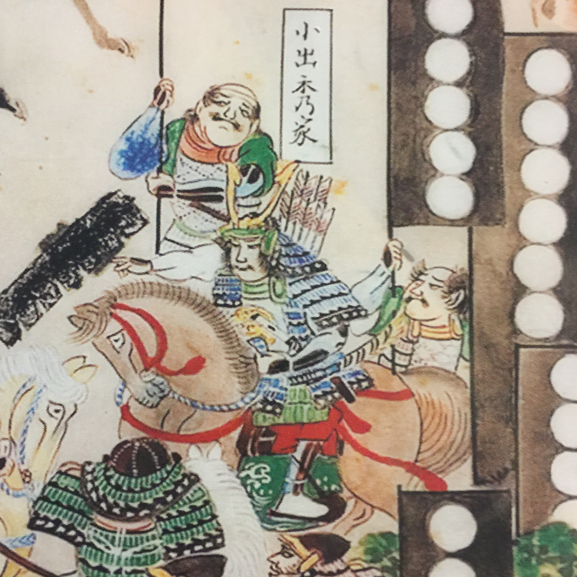 関ヶ原合戦図屏風（関ケ原町歴史民俗資料館本）に描かれた、徳川家家臣の小出秀家。旗印から、一説には亀井茲矩との貼札錯誤。